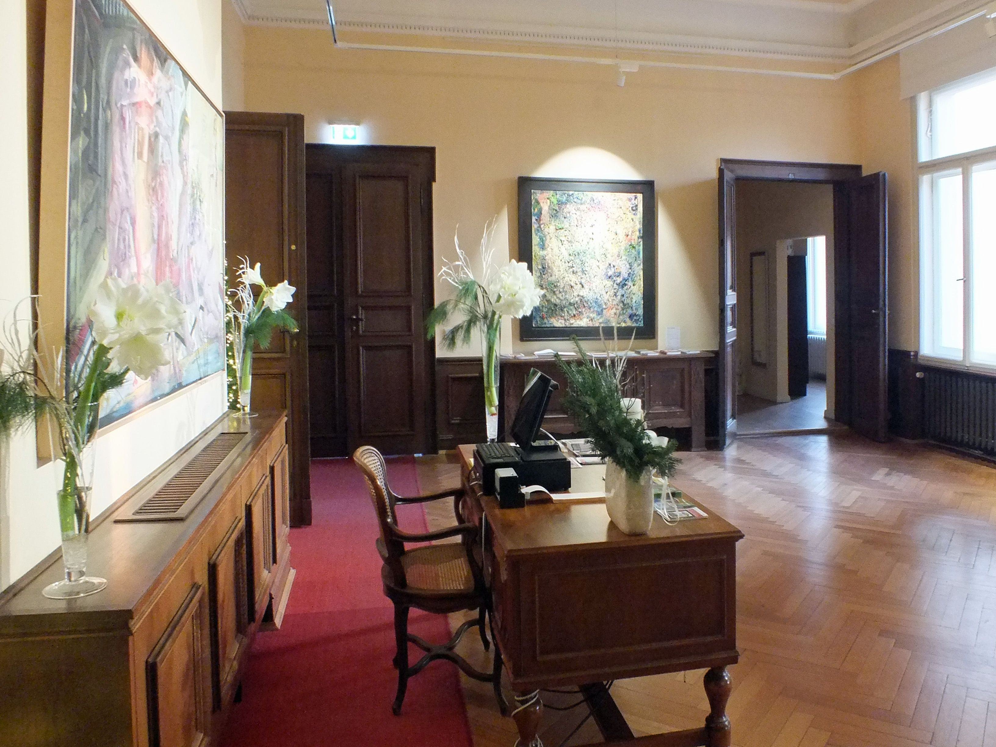 Weißes Haus Markkleeberg, Foyer im ersten Stock